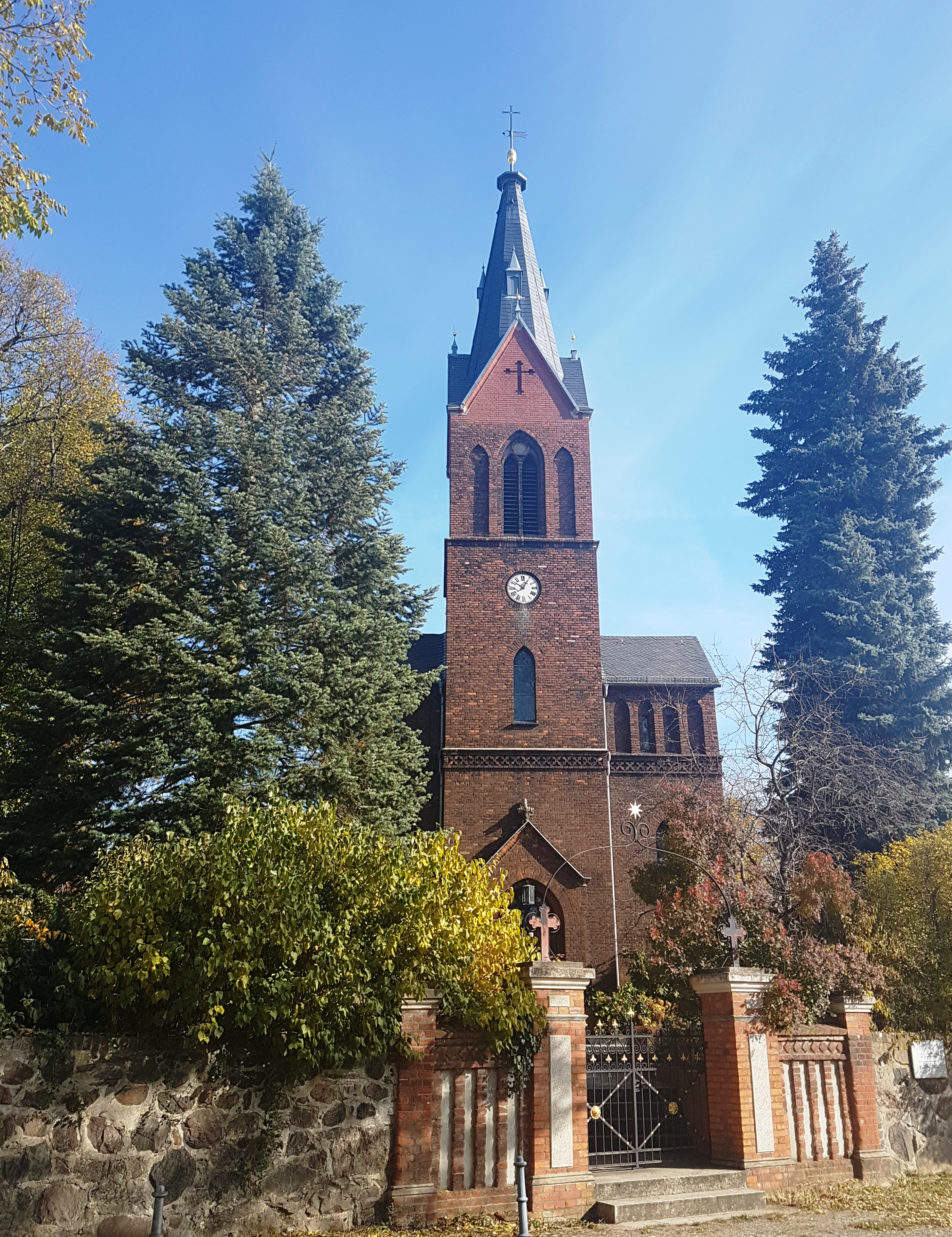 Церковь Христа, район Каульсдорф в Берлине